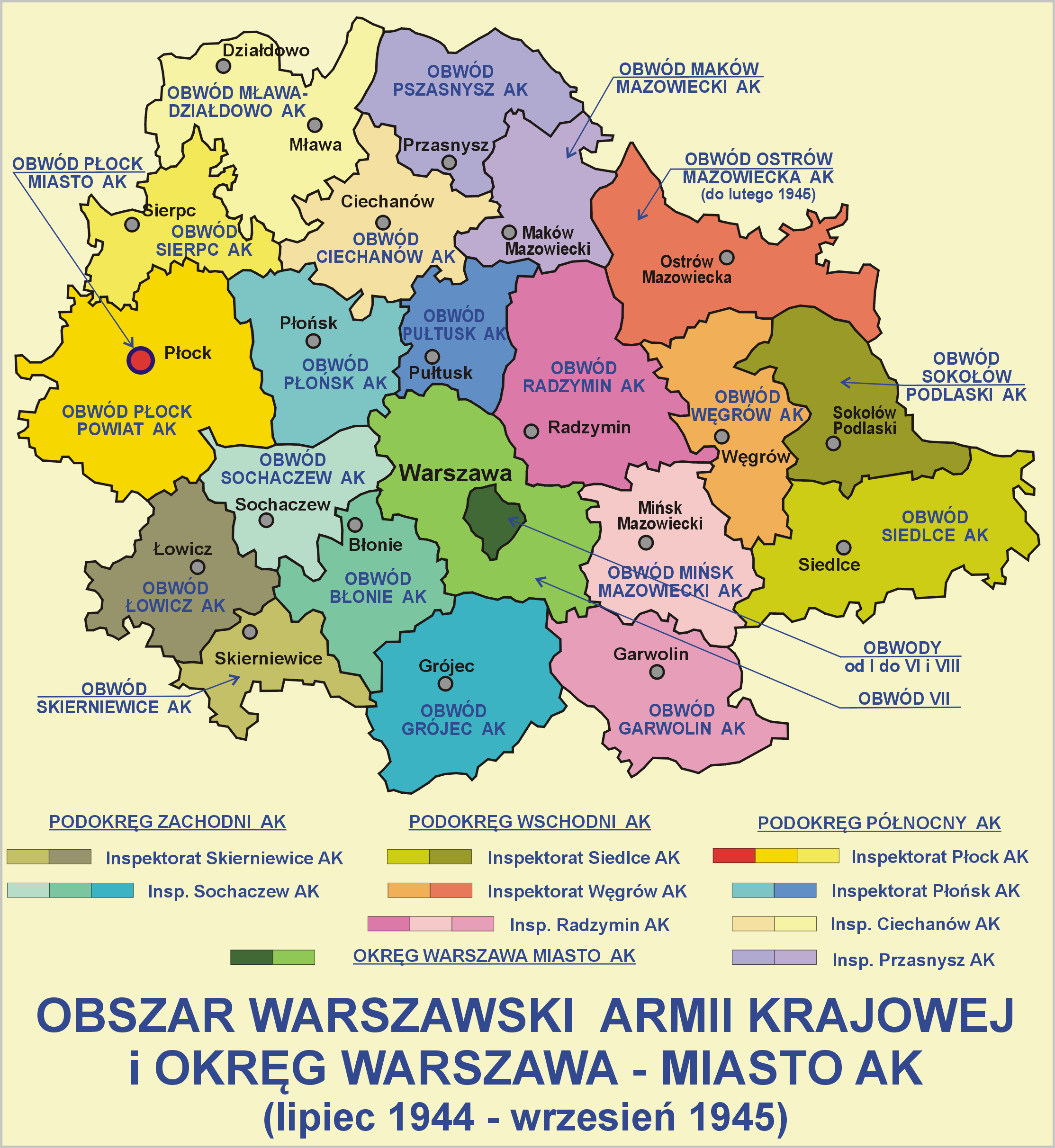 Obszar Warszawa AK i Okręg Warszawa - Miasto AK (lipiec 1944 - wrzesień 1945)